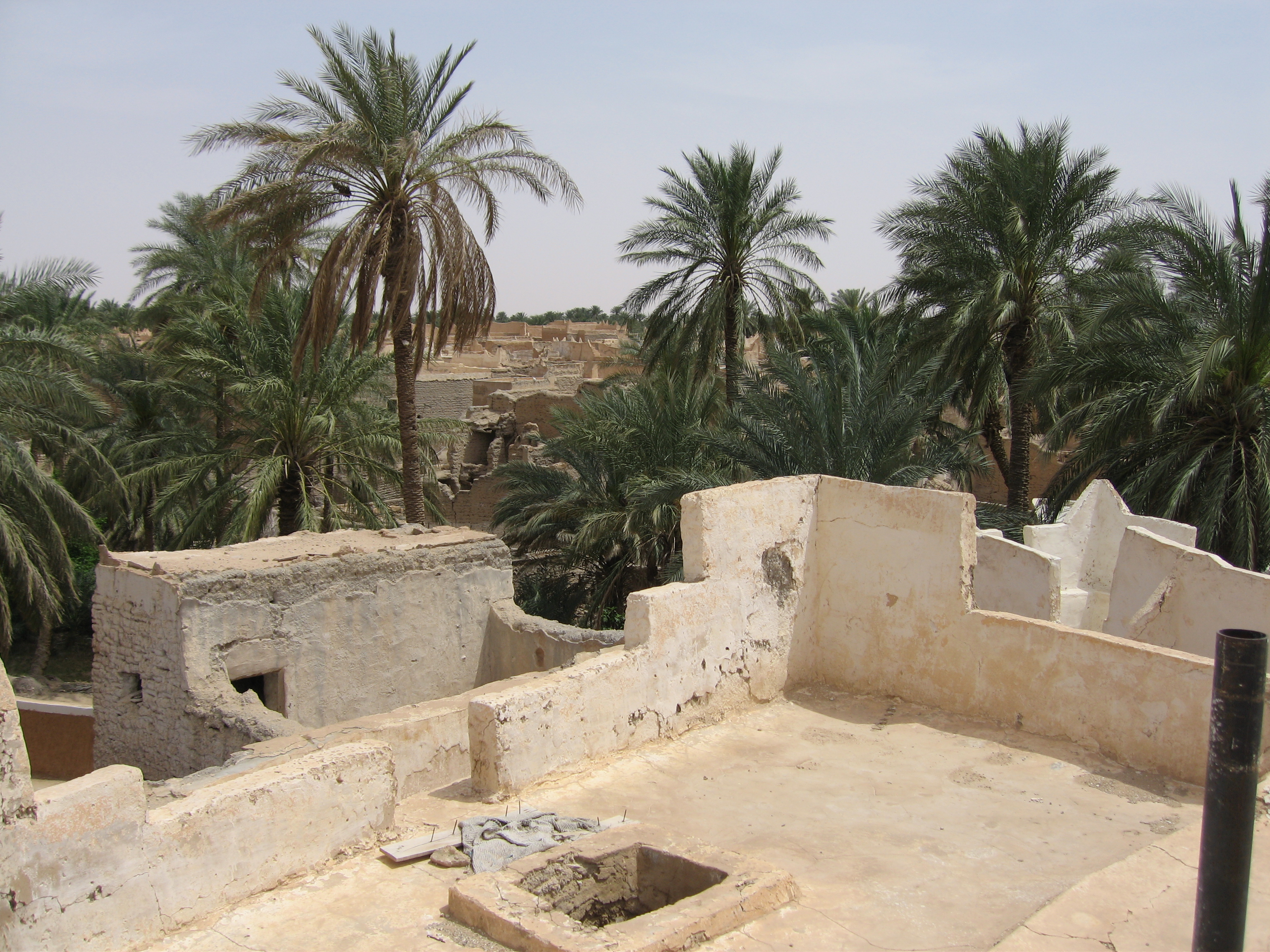 Foto tomada en Ghadames, Libia, en 2006 desde uno de los terrados de la ciudad vieja.